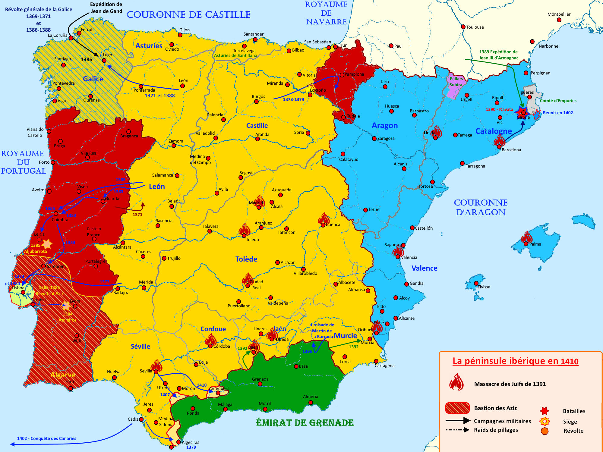 Carte de la péninsule ibérique en 1410 avec la guerre de succession du Portugal